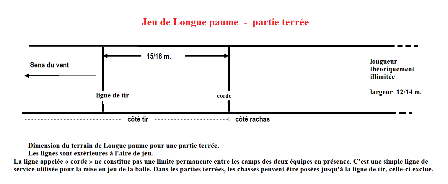 Dimension du terrain pour le jeu de longue paume - partie terrée